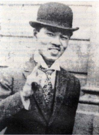 Young Ohsawa in Paris (1920)